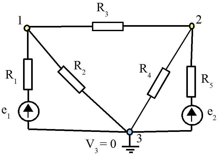 Електрическа верига с три възела и 5 клона